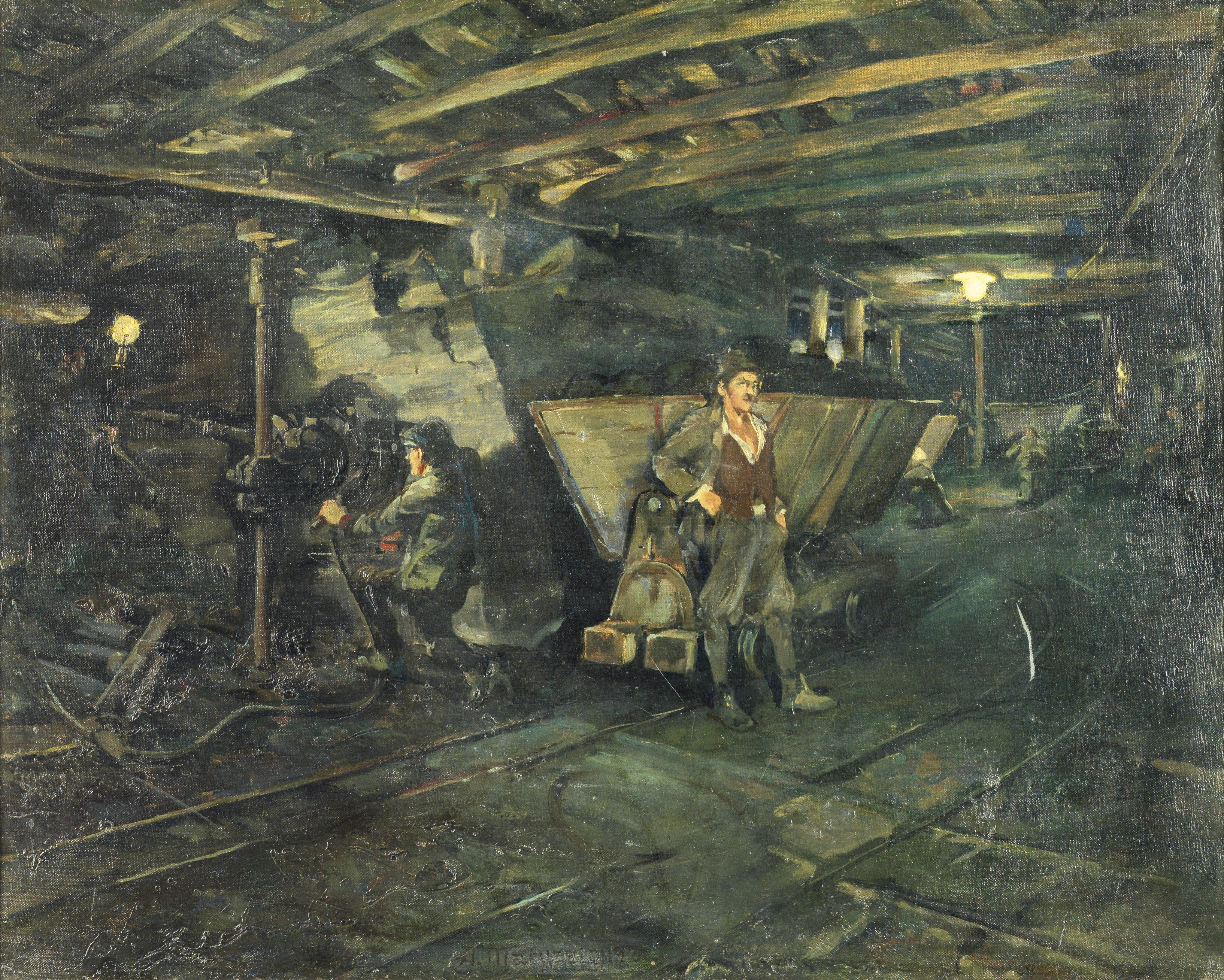 Bergbauszene